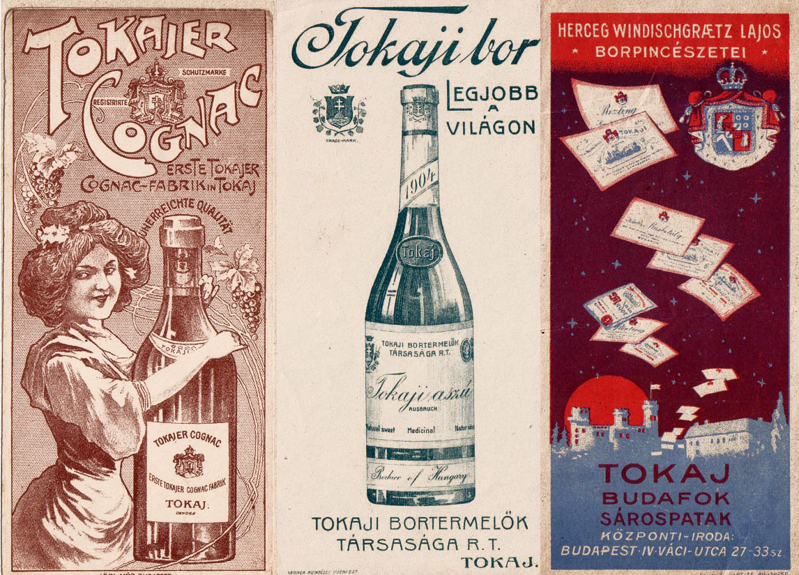 Tokaji bor reklámok a XX. sz. elejéről.